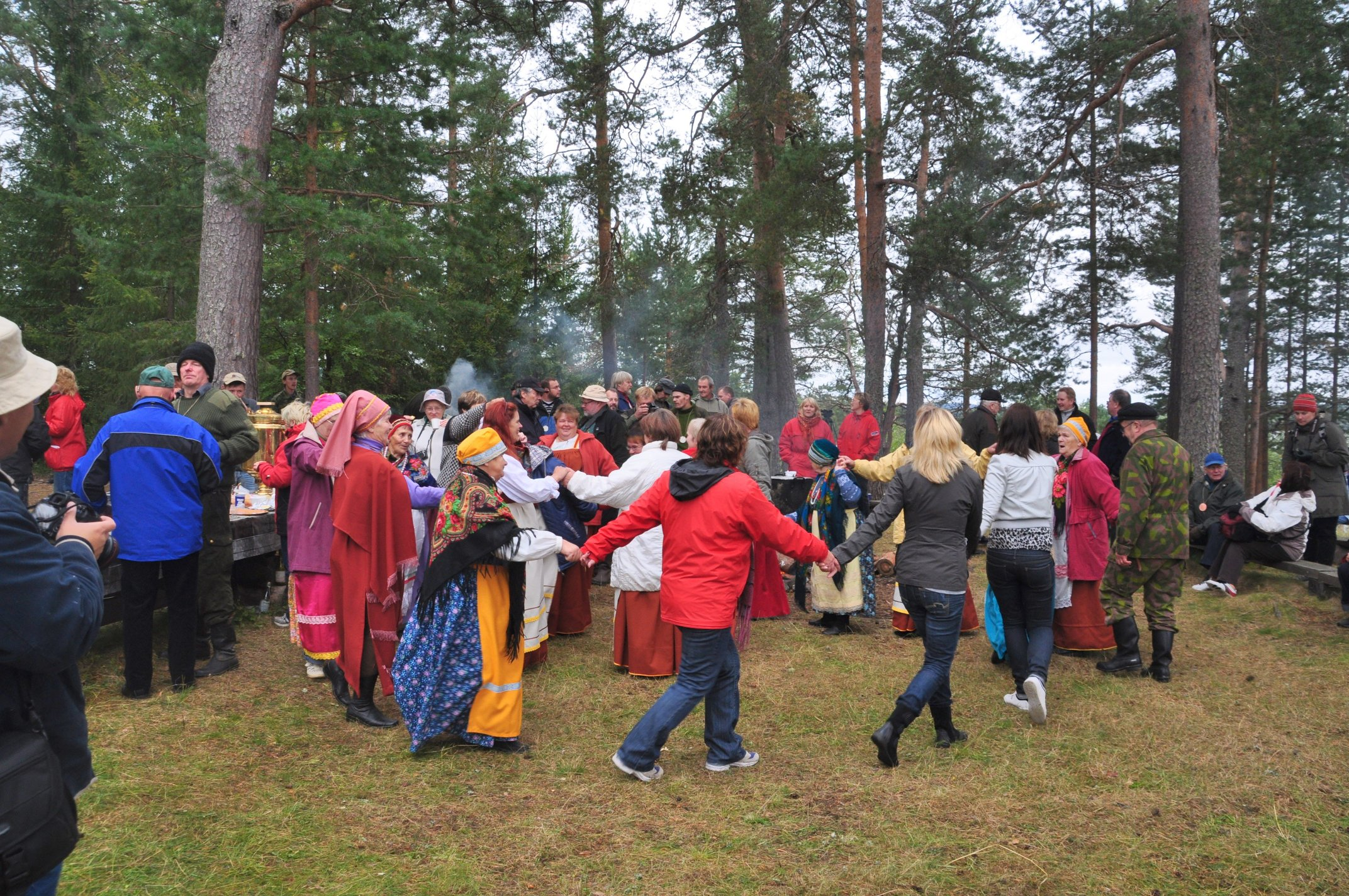 Pokkojuhla väkeä Venehjärvellä